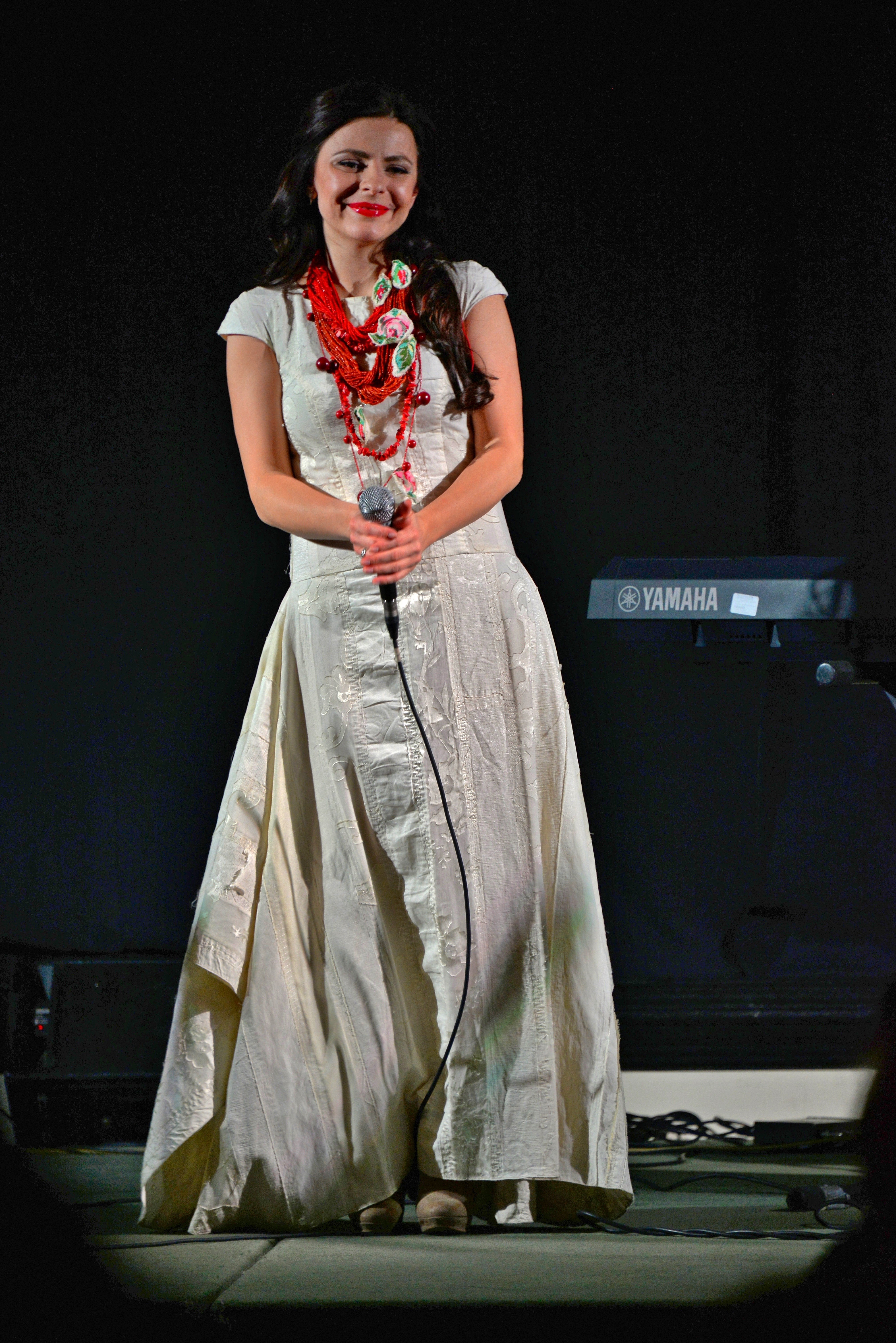 Співачка Оксана Муха на концерті в Торонто, 2016